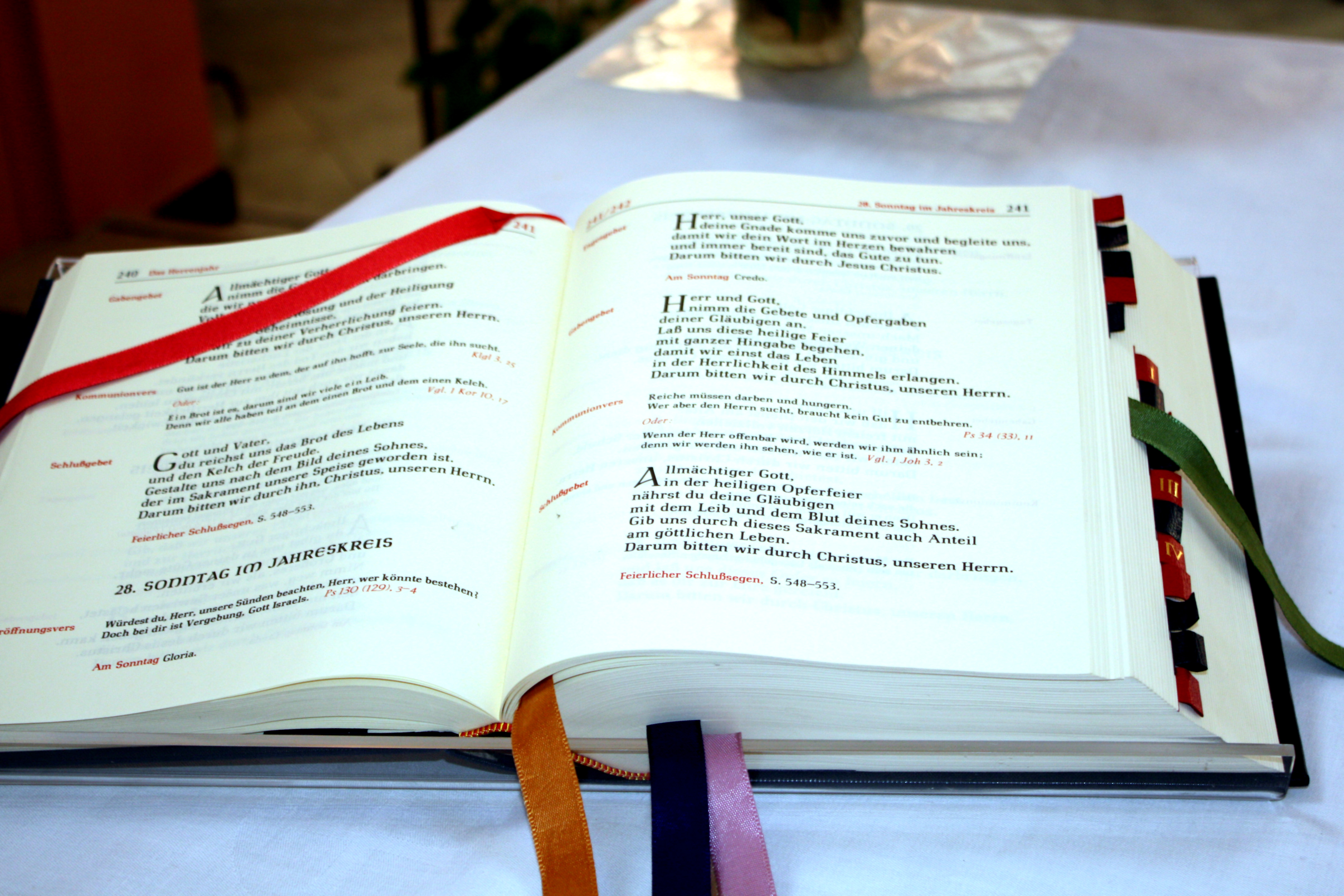 St. Anna-Haus, Köln-Lindenthal. Missale